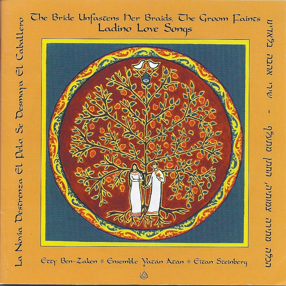 תקליטור שירי-לאדינו בביצוע בן-זקן, ציור העטיפה: אתי בן-זקן